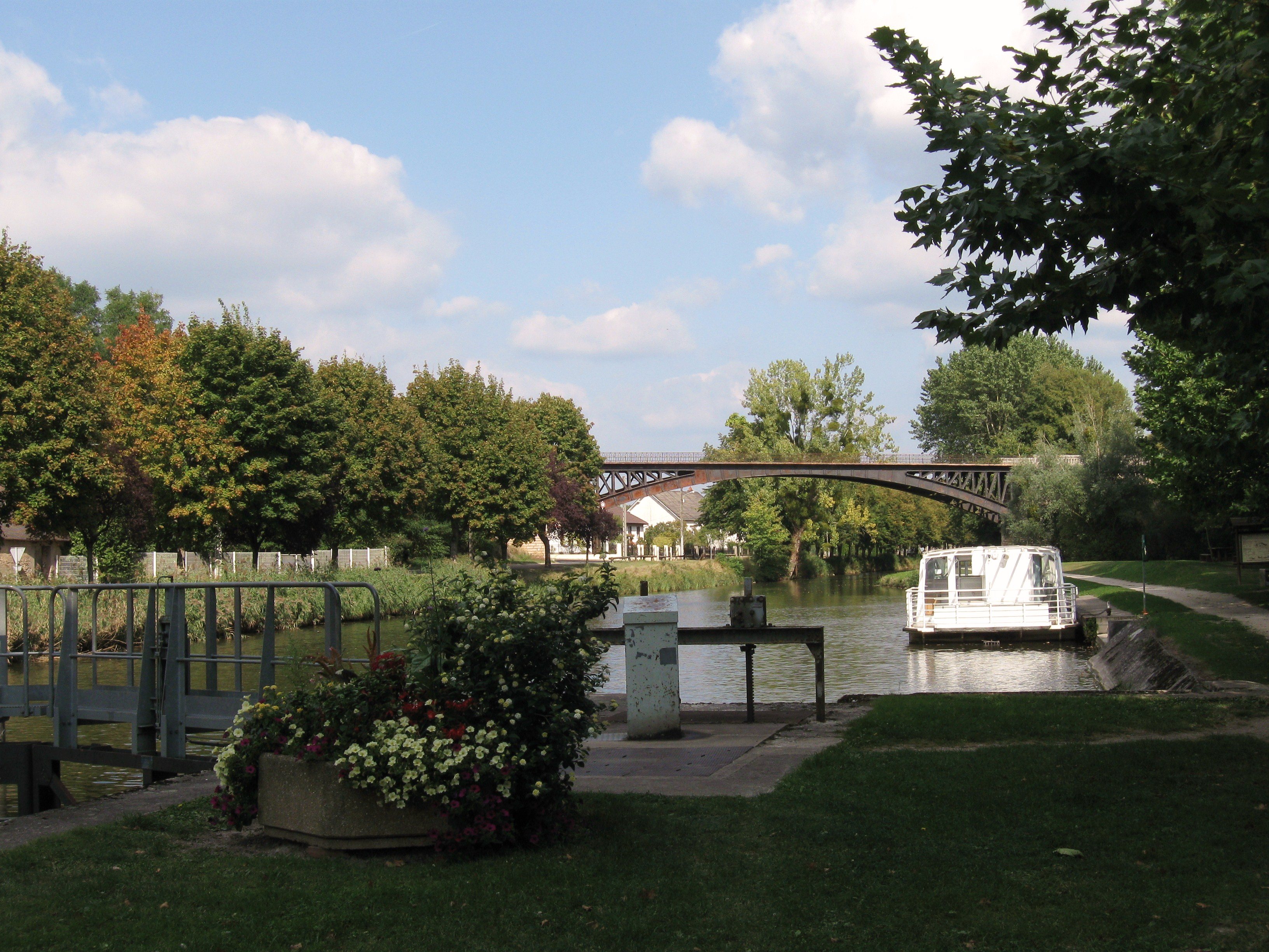 Canal d'Orléans, Mardié, Loiret, France